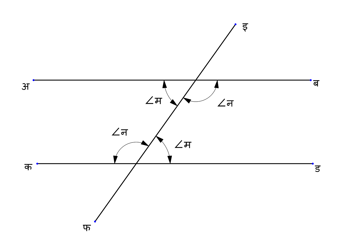 व्युत्क्रम कोन